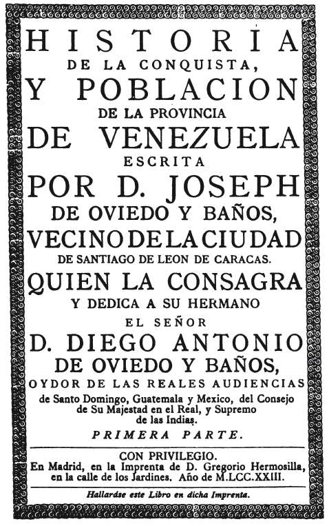 Portada de Historia de la conquista y población de la Provincia de Venezuela del historiador Venezoalano José de Oviedo y Baños